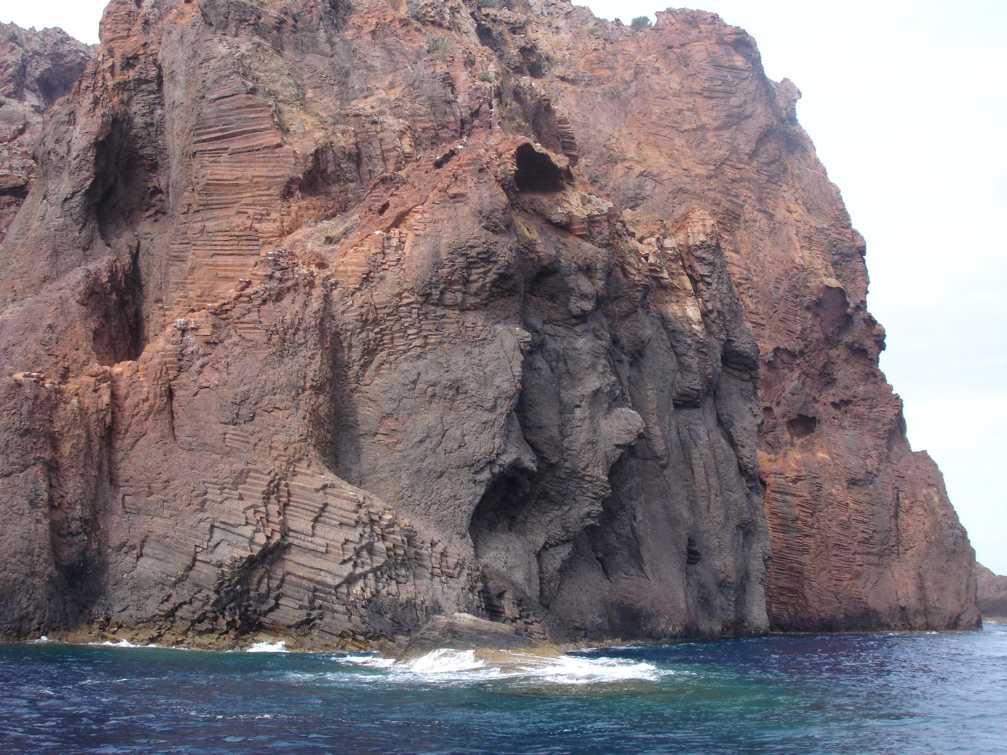 France, Corse-du-Sud (2A), Réserve de Scandola